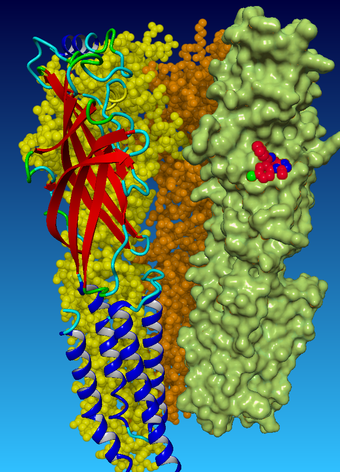 PDB:6huo Masiulis S, Desai R, Uchański T, Serna Martin I, Laverty D, Karia D, Malinauskas T, Zivanov J, Pardon E, Kotecha A, Steyaert J, Miller KW, Aricescu AR (2019): Nature. PMID:30602790; Seitenansicht bei ausgeblendeter alpha1'-Untereinheit; Alprazolam mit roten Kohlenstoffkalotten.